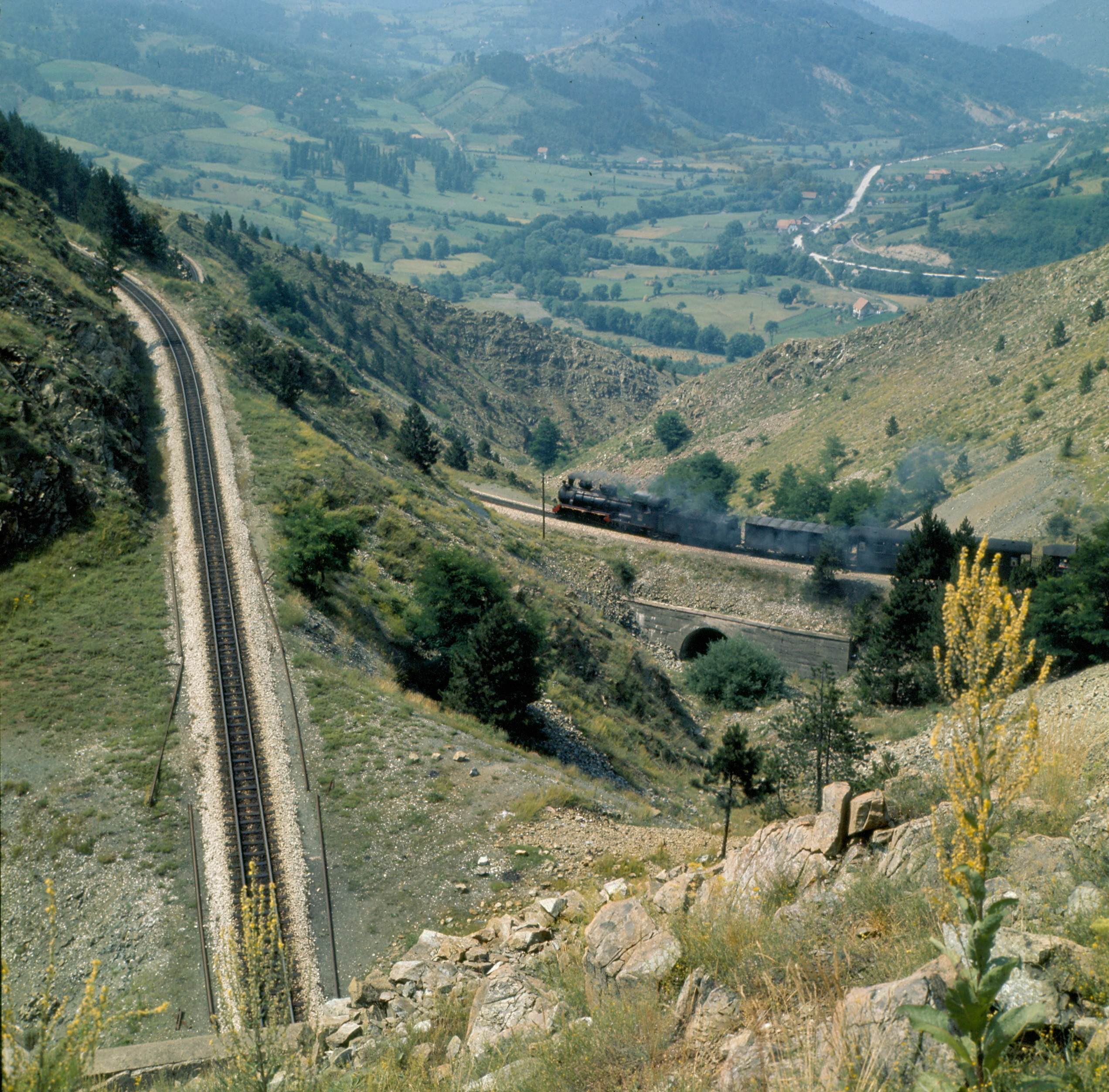 Šarganska osmica: Personenzug in Talfahrt, geführt von BR85.Im Tal Mokra Gora